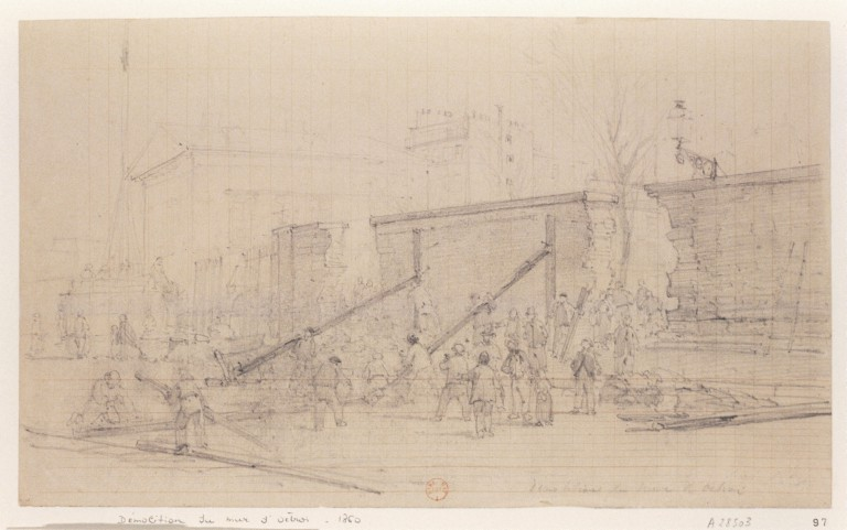 Démolition du mur d'octroi parisien (1860)